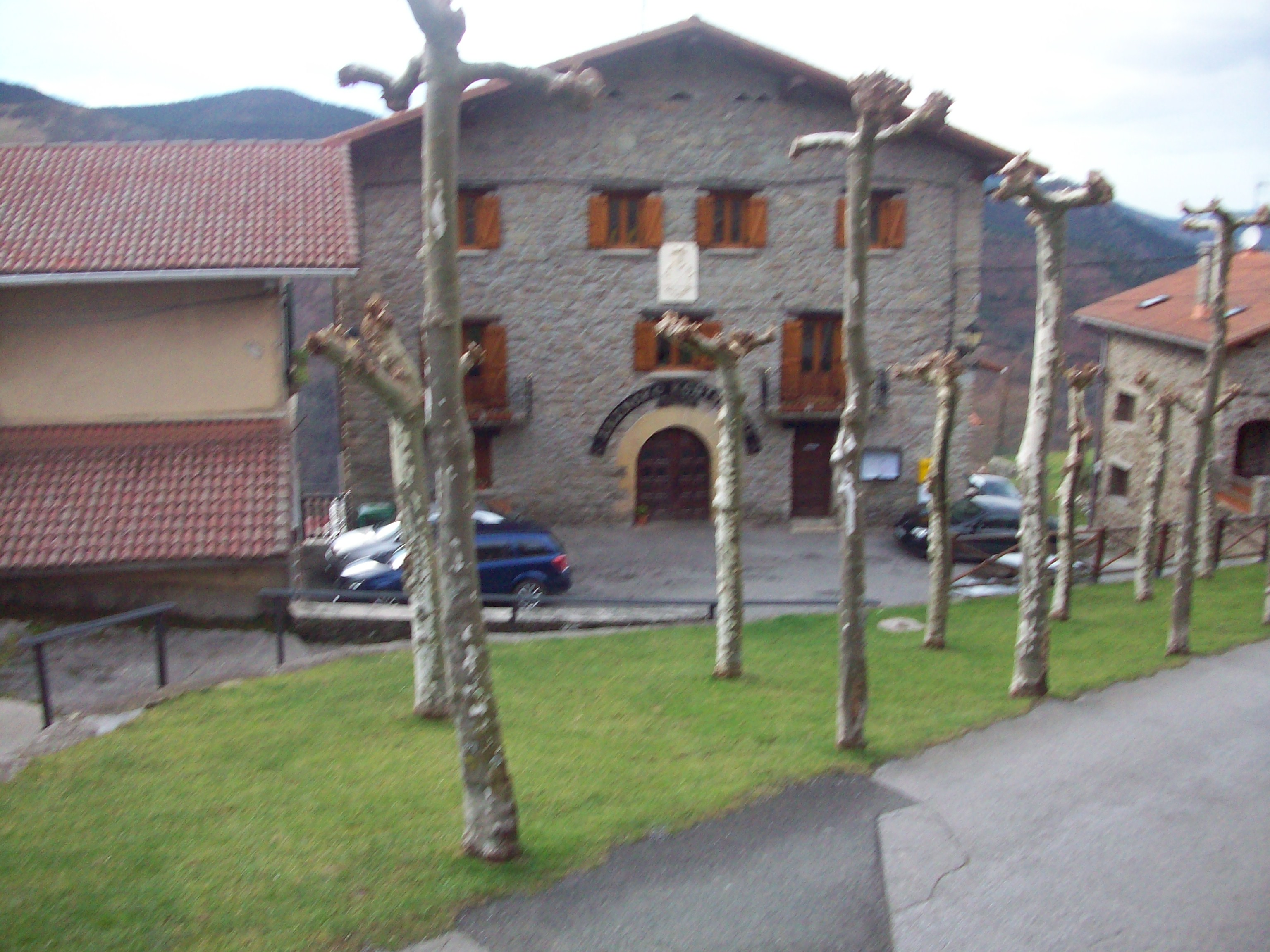 Aranoko udaletxea. Nafarroa, Euskal Herria.